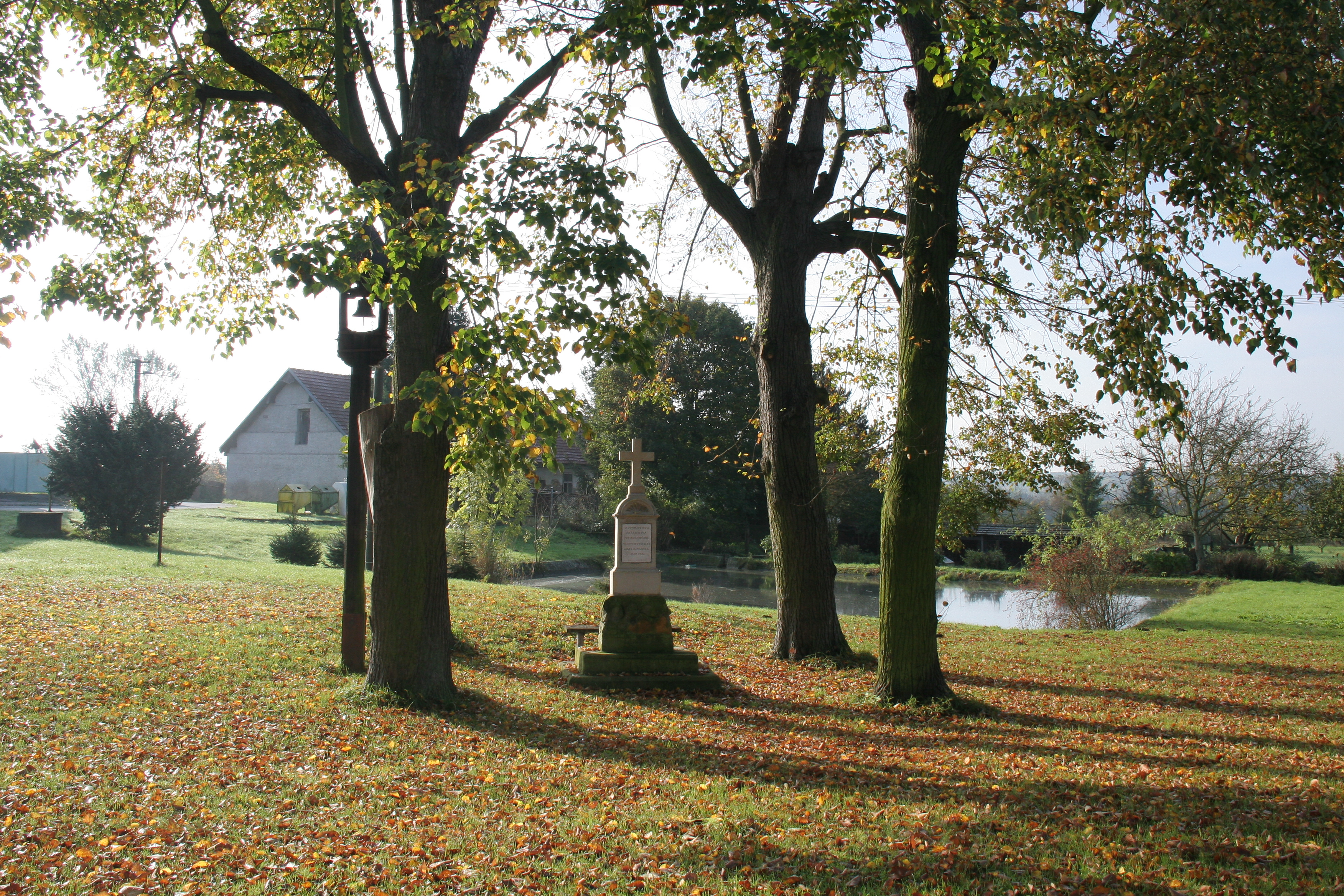 Levín kříž